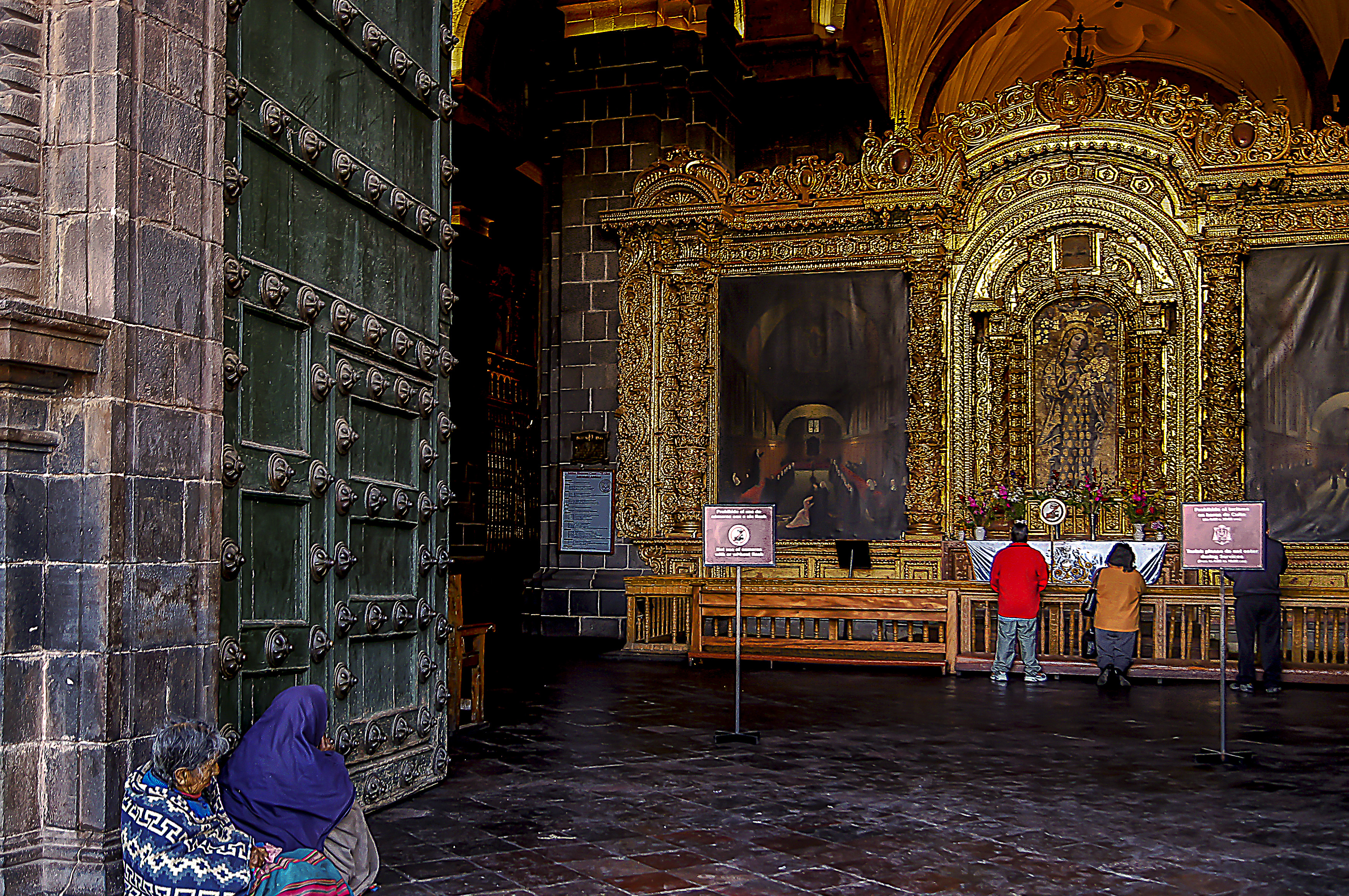 Interior de La Catedral del Cuzco